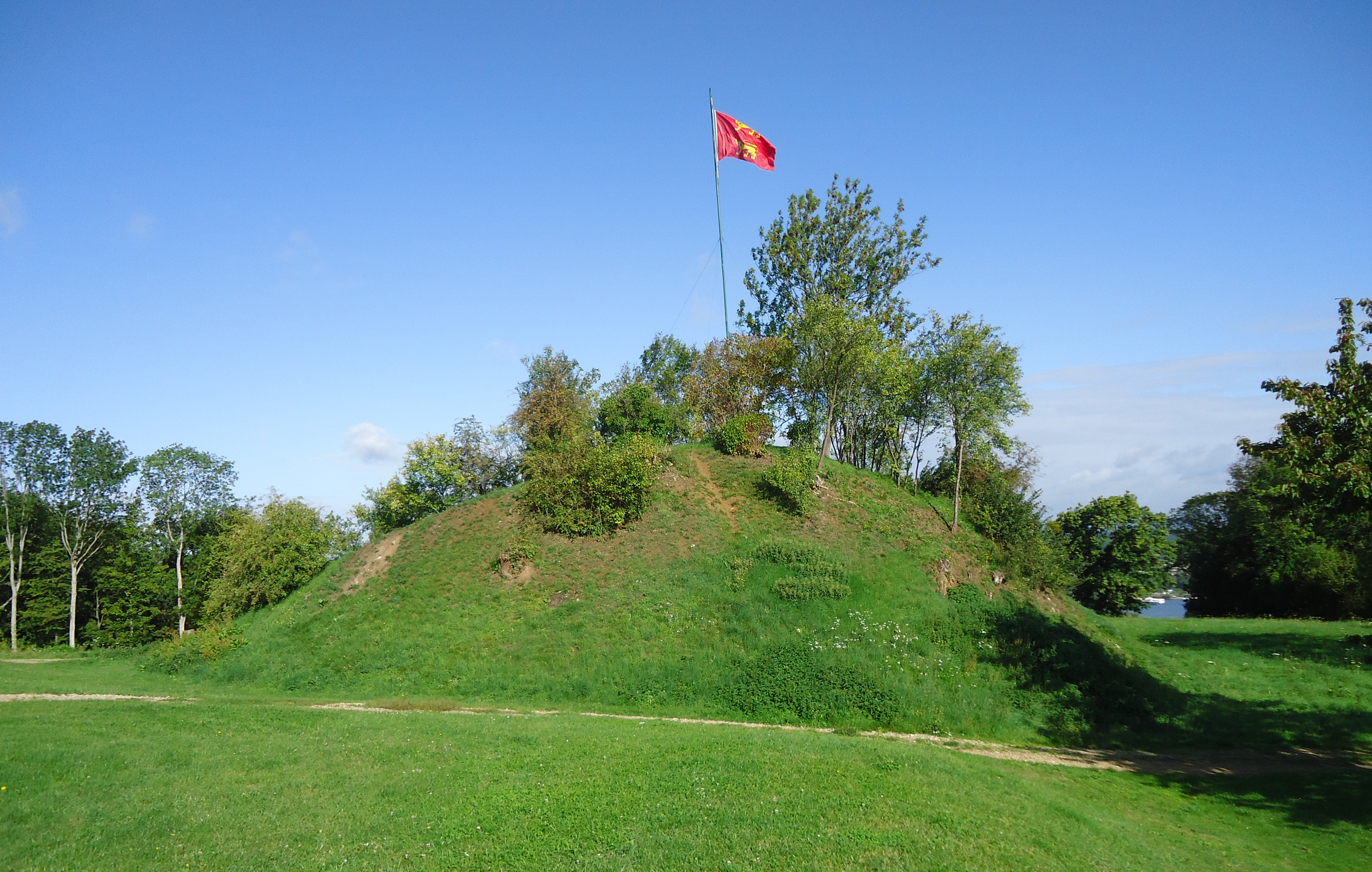 Venables - Motte castrale